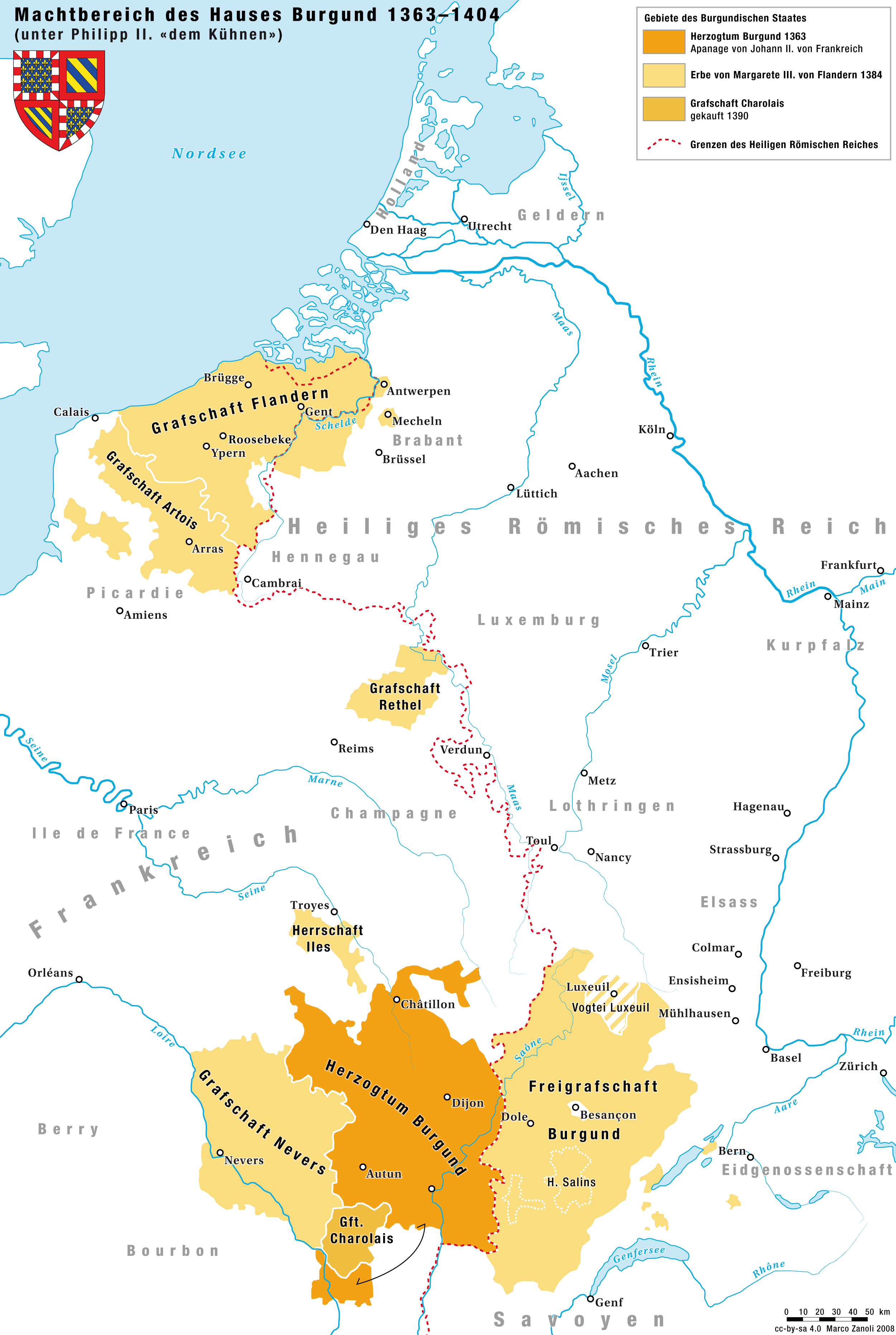 Das Herrschaftsgebiet des Hauses Burgund unter Philipp II., dem Kühnen, zwischen 1363 und 1404